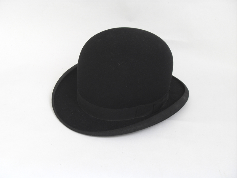 Μπόουλερ μαύρο. Βιέννη 1998.6.221 / Συλλογή Πελοποννησιακού Λαογραφικού Ιδρύματος